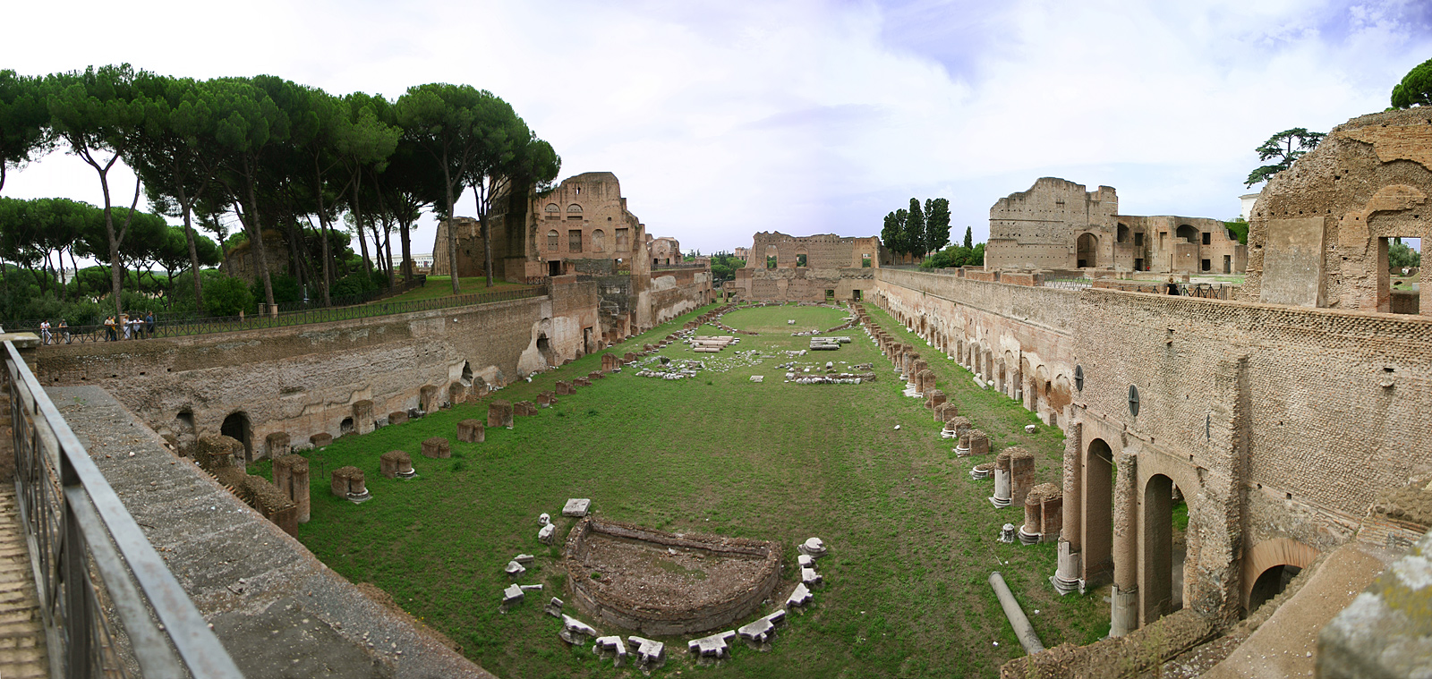 Blick über das Privat stadion des Domitian Palastes auf dem Palatin